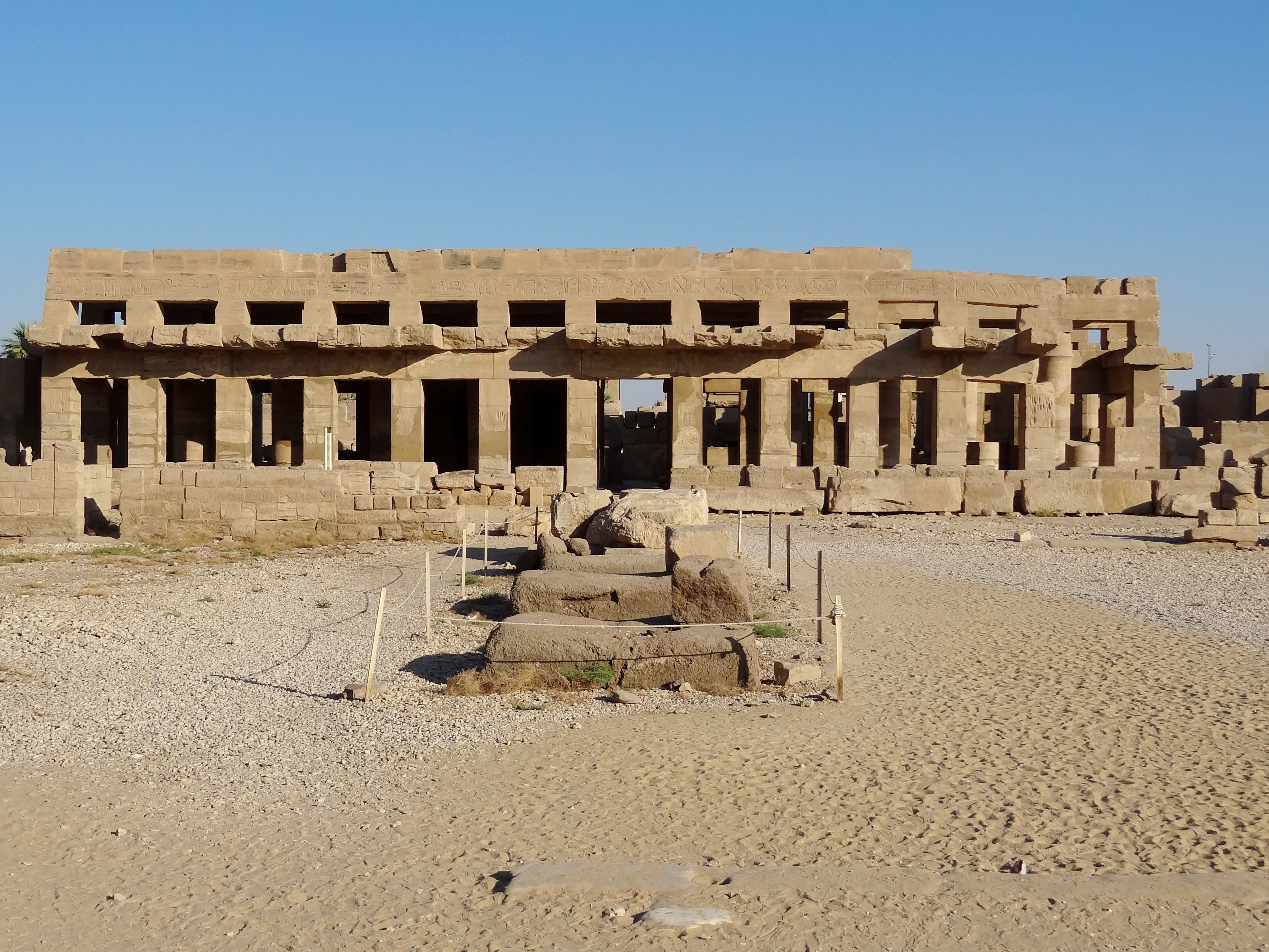 Ach-menu (‚Erhaben ist das Andenken‘), Tempel Thutmosis III., im Tempel von Karnak, nördlich von Luxor, Ägypten